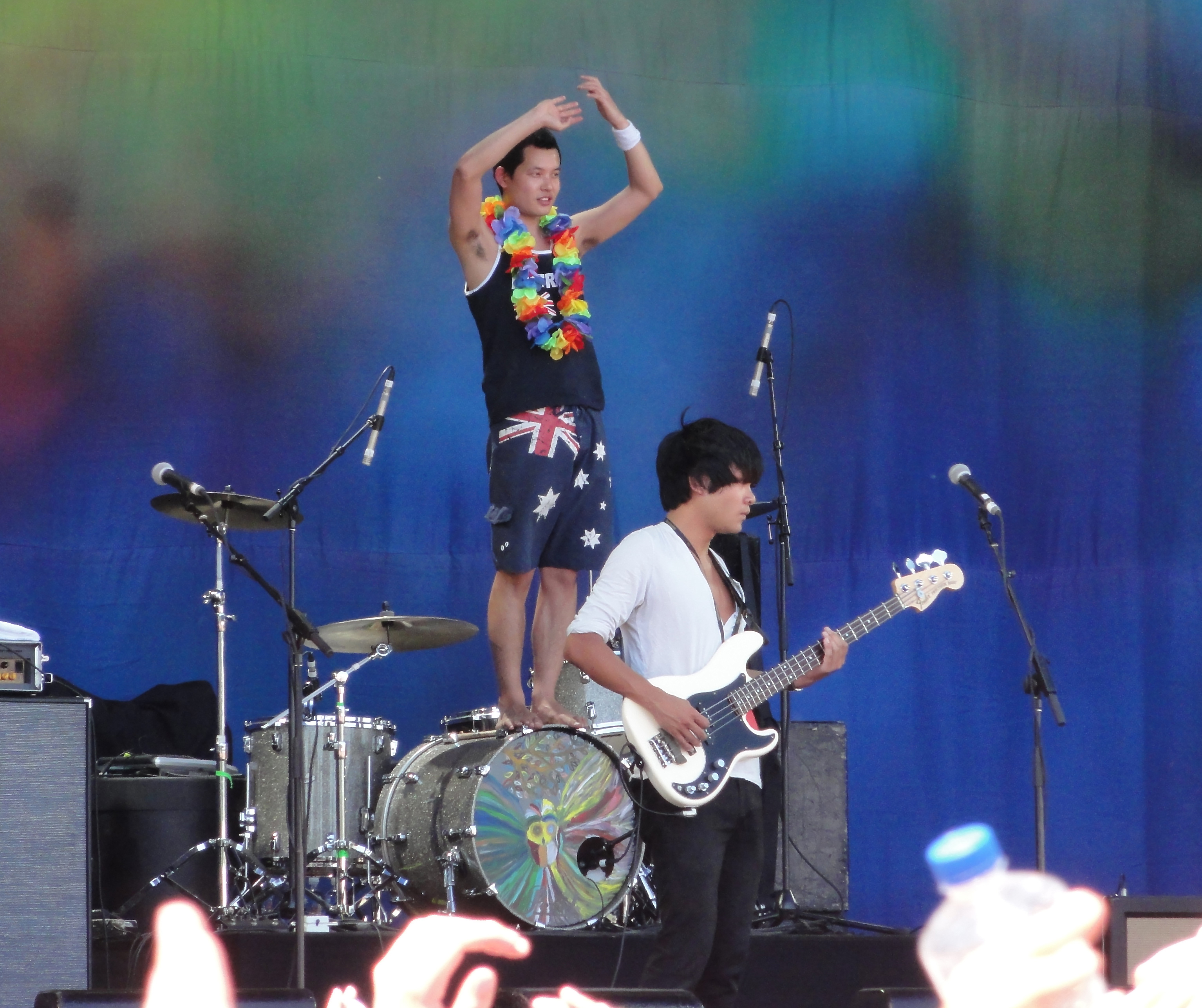 Little Red